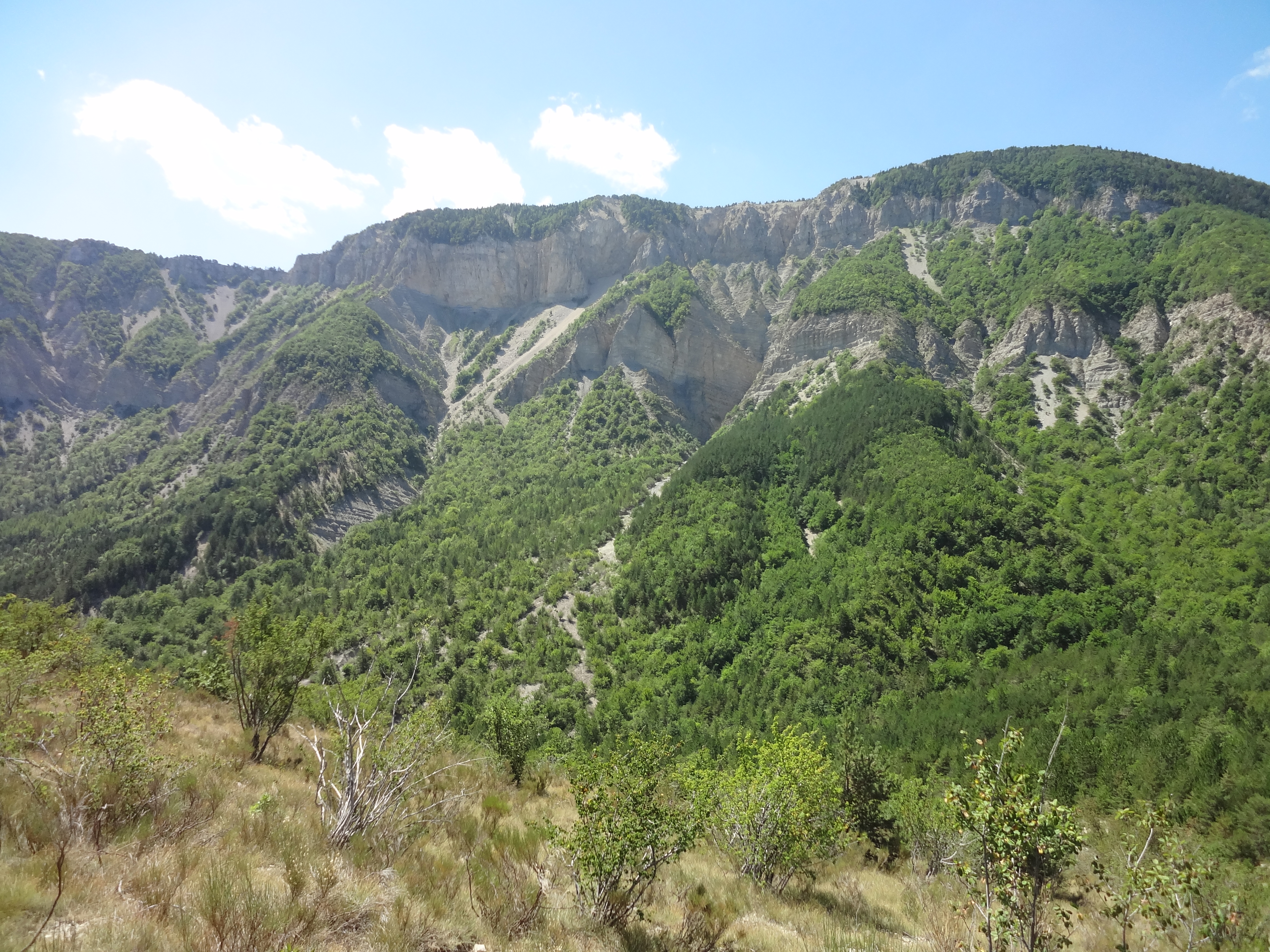 Versant nord de la montagne de lure sous le Tréboux